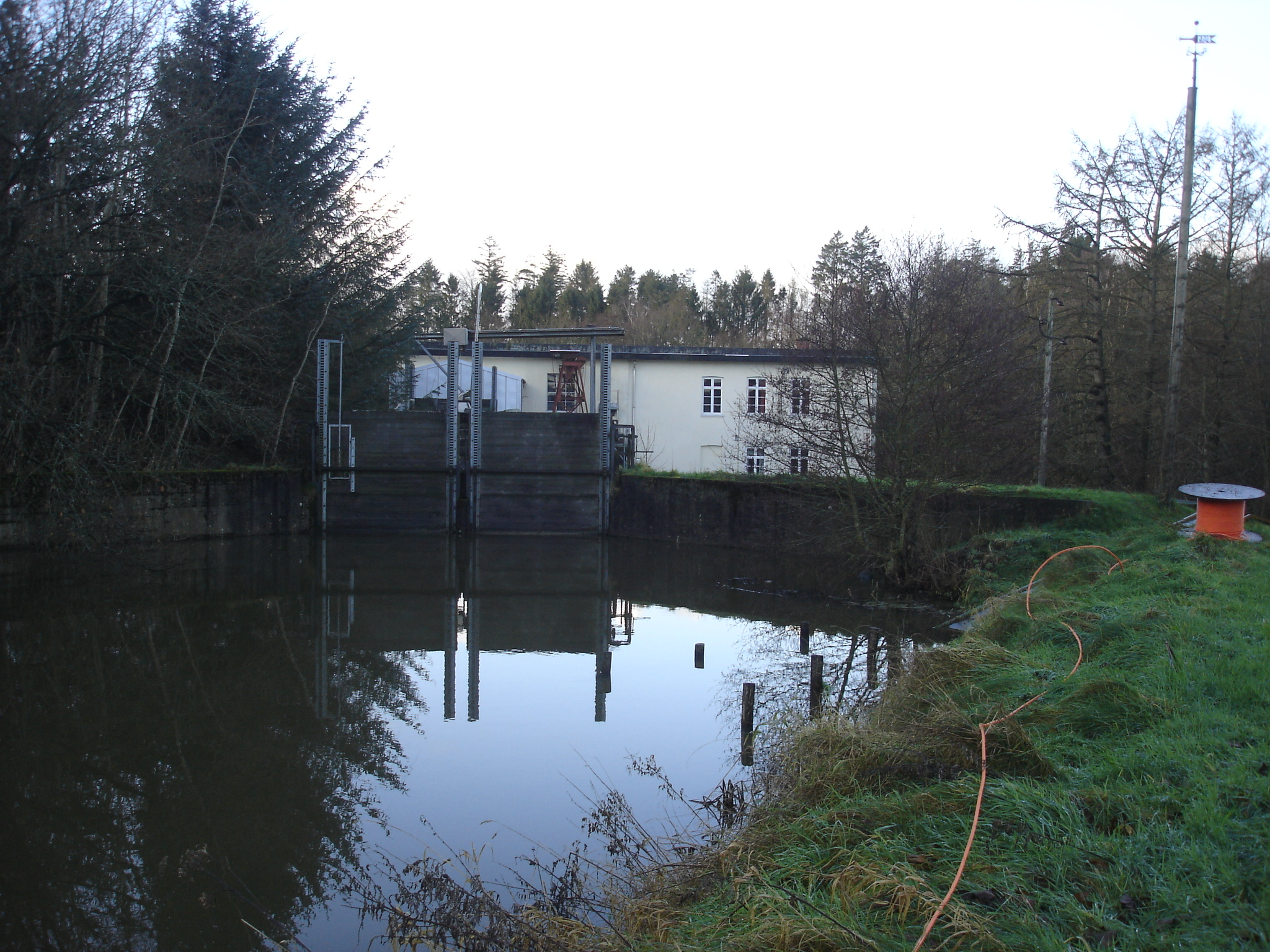 Vestbirk Kraftværk fra kanalen